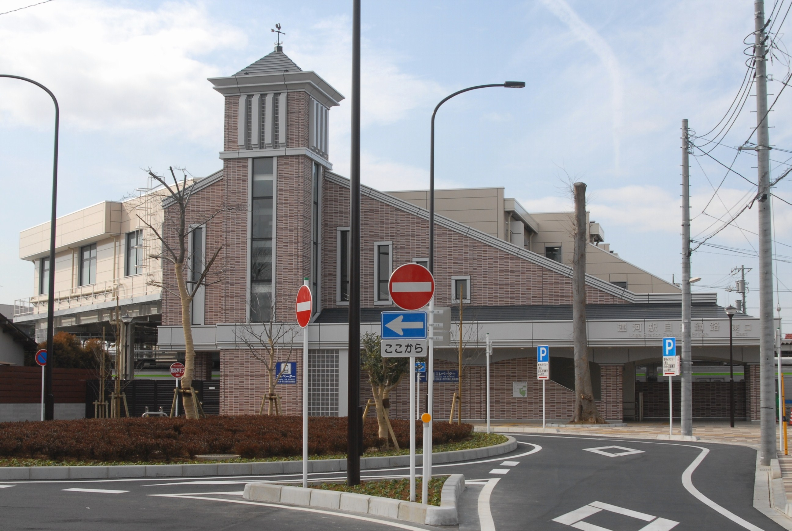 運河駅東口の駅舎。